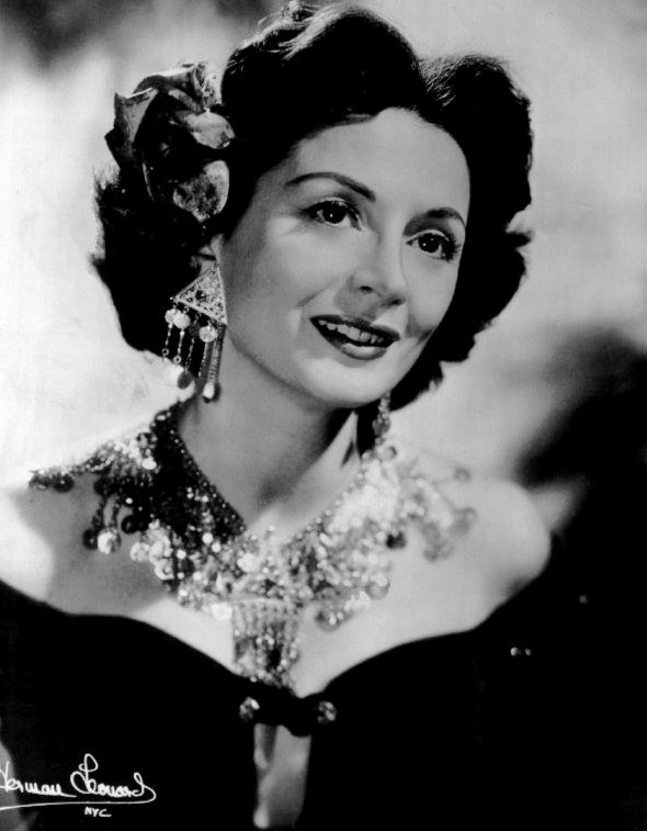 Photo of vocalist Mimi Benzell.